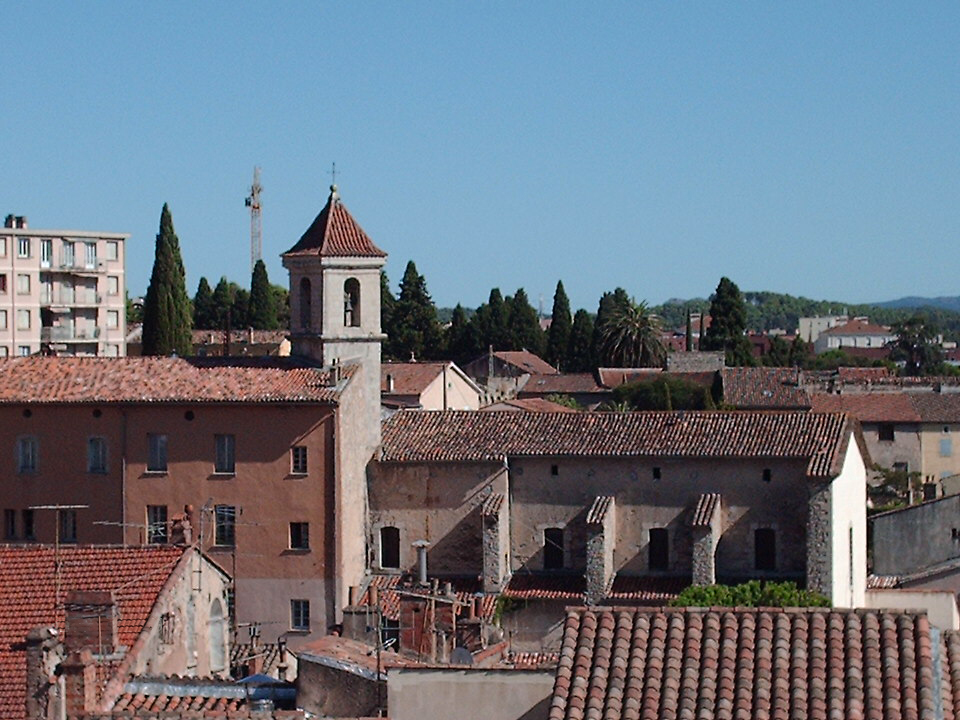 Ancien couvent et Chapelle des Minimes du XVII° siècle à Draguignan